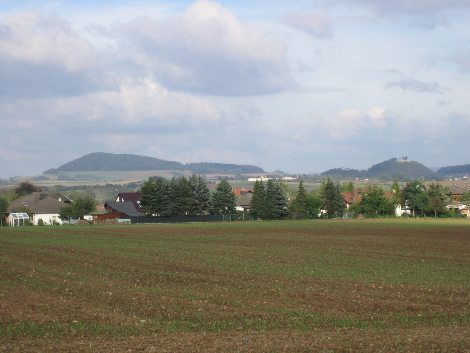 Blick von Süden auf Odenberg (links), Scharfenstein, Wenigenburg und Obernburg (rechts) bei Gudensberg in Hessen